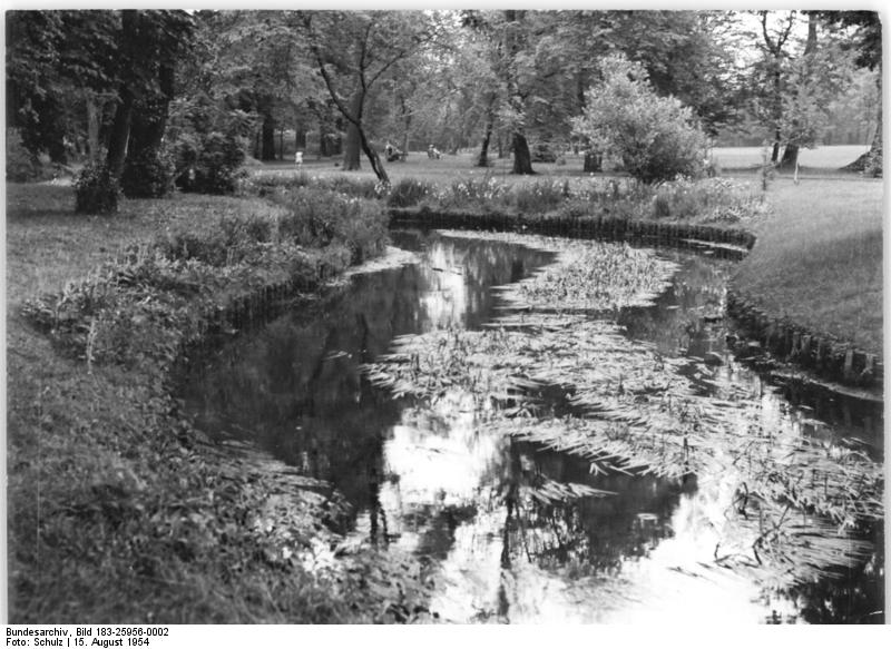 Berlin-Pankow, Schloßpark, Panke Zentralbild Schulz 15.8.1954 Fotowettbewerb Die Panke im Schlosspark (Berlin)